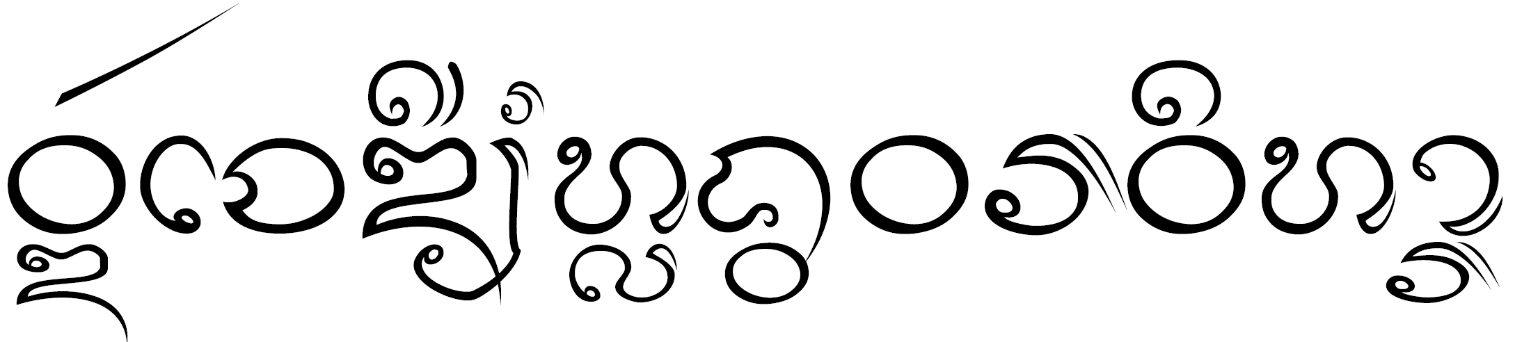 Lanna Script